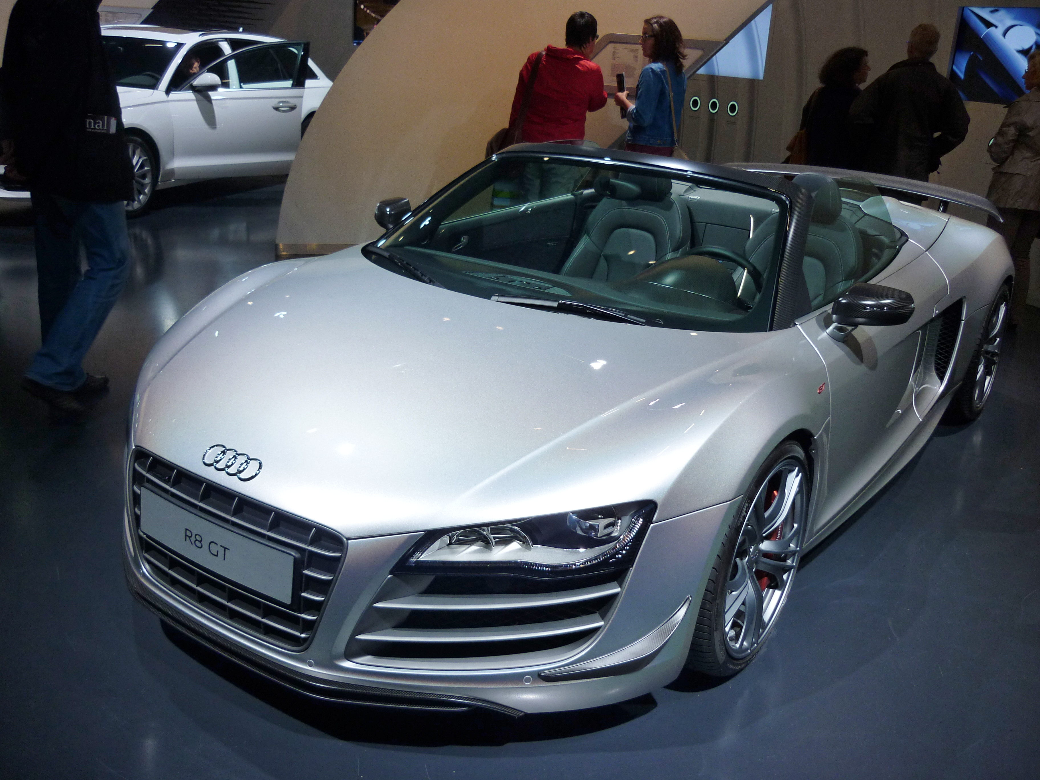 Autostadt Wolfsburg